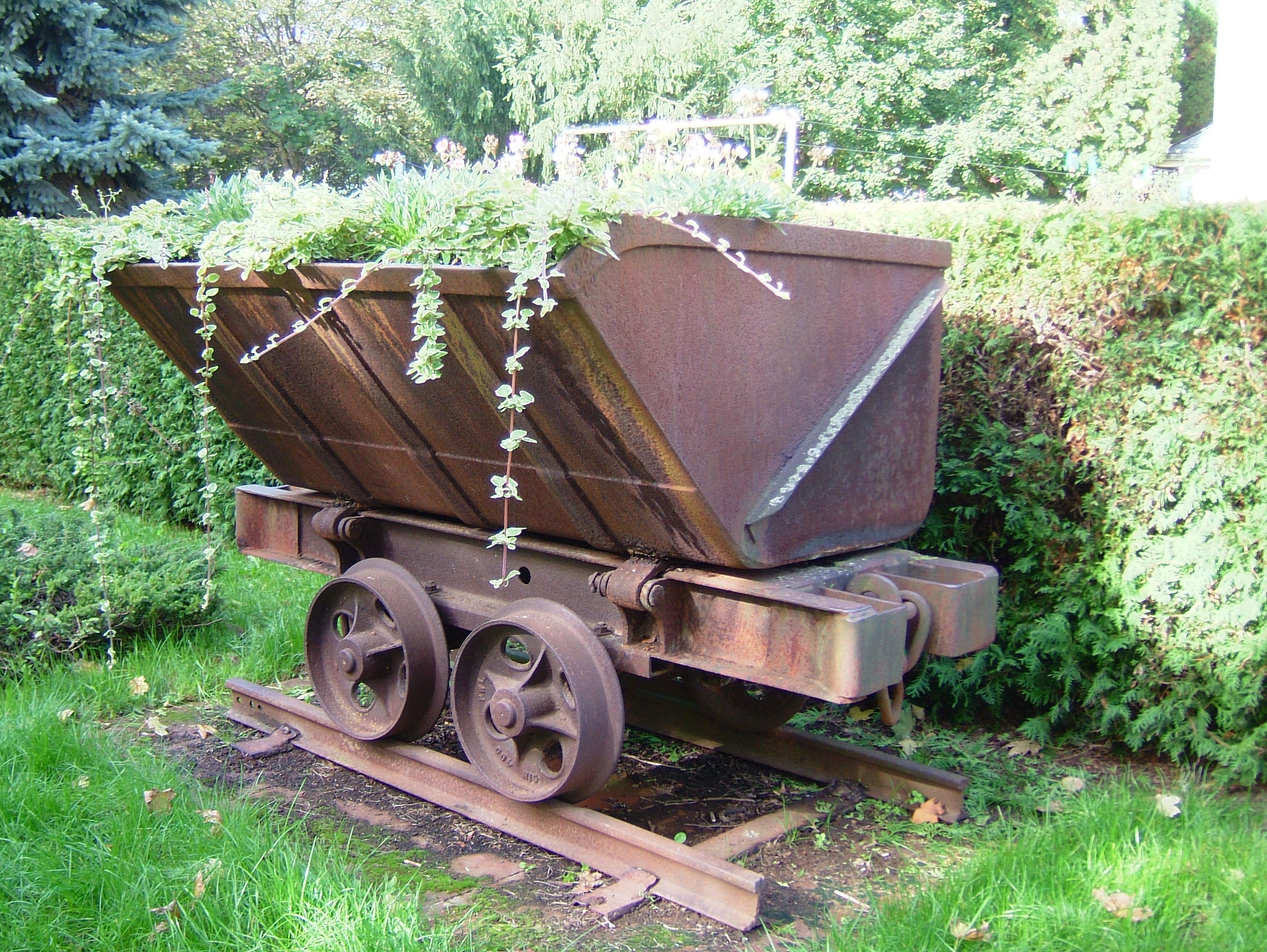 E Minette-Buggy zu Keel.